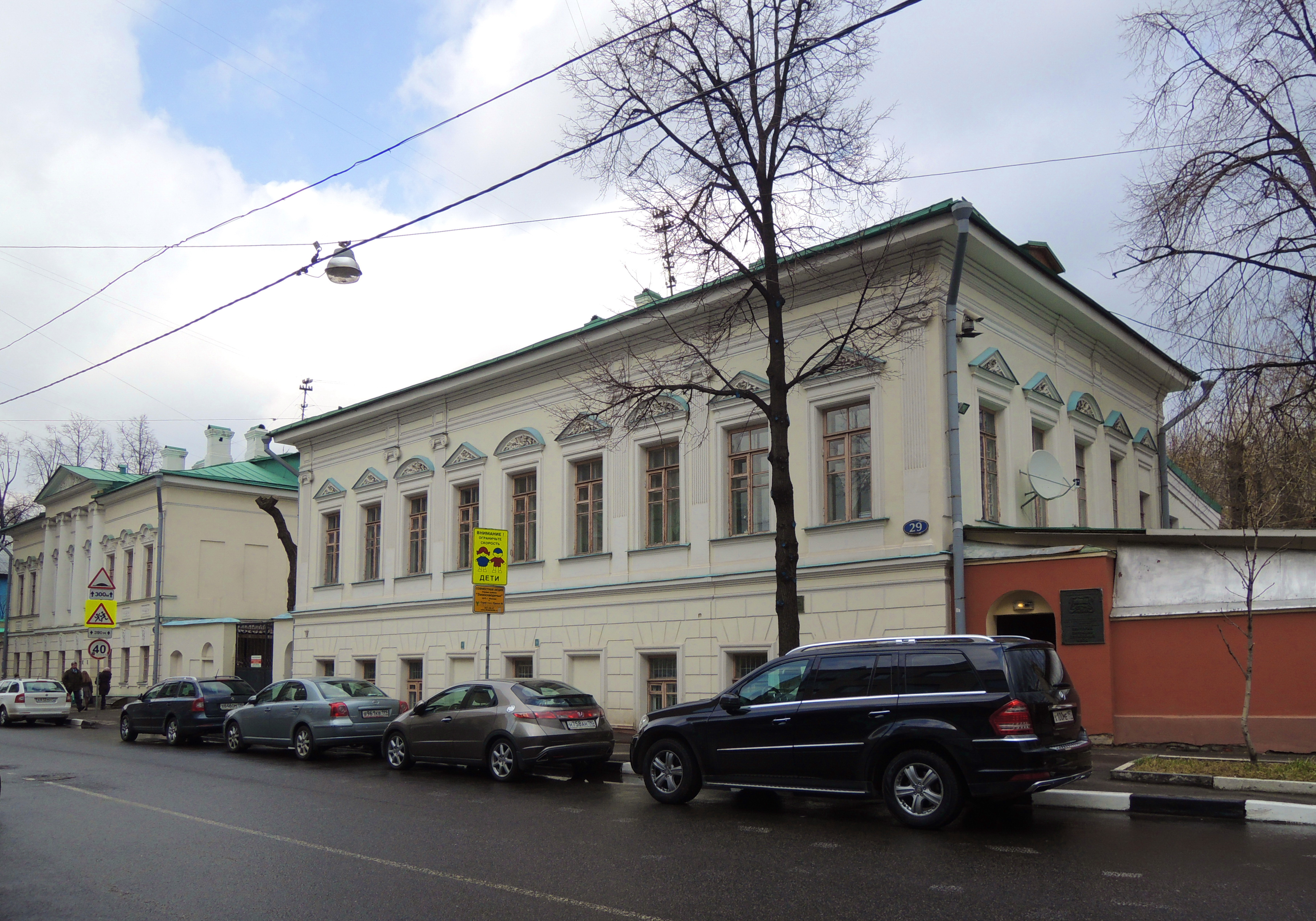 ул. Бахрушина